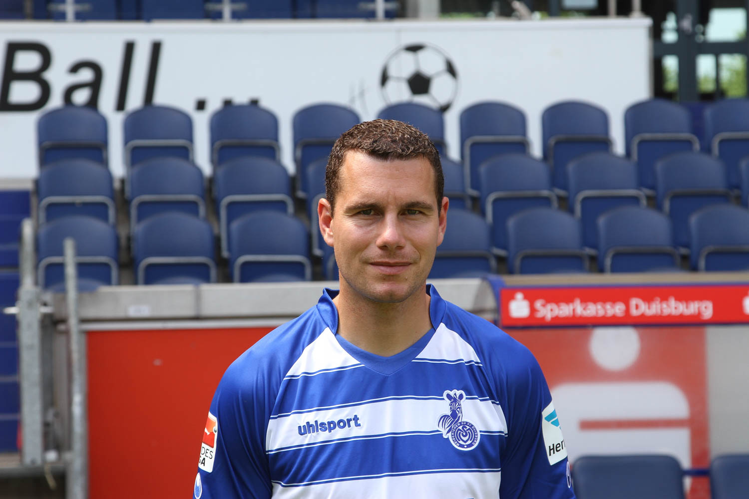 Thomas Bröker 2015